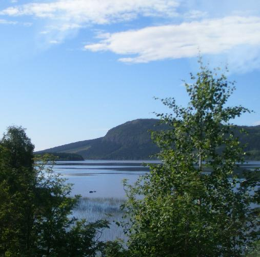 Utsikt mot Hällberget.